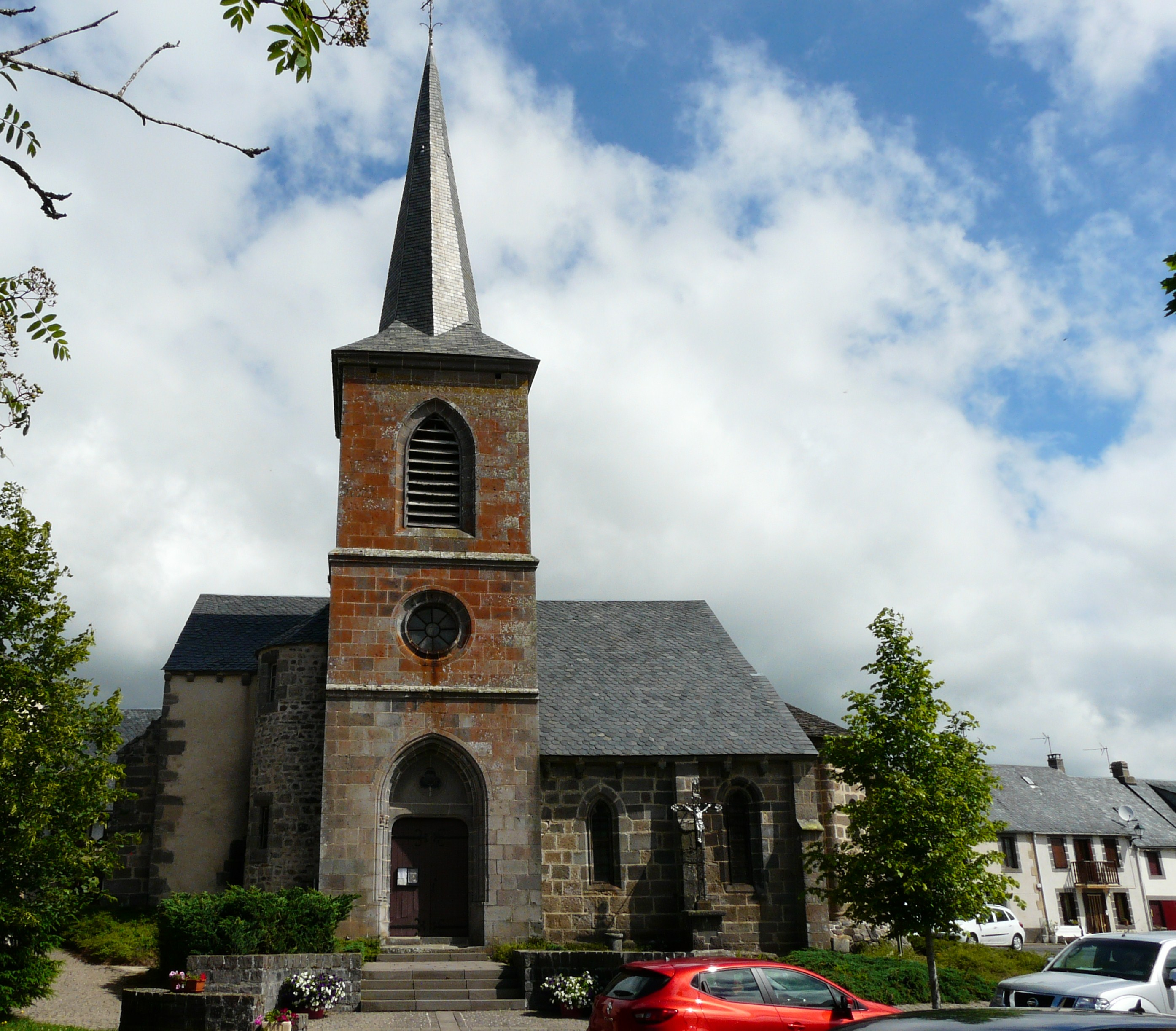 L'église Saint-Donat de Saint-Donat, Puy-de-Dôme, France.